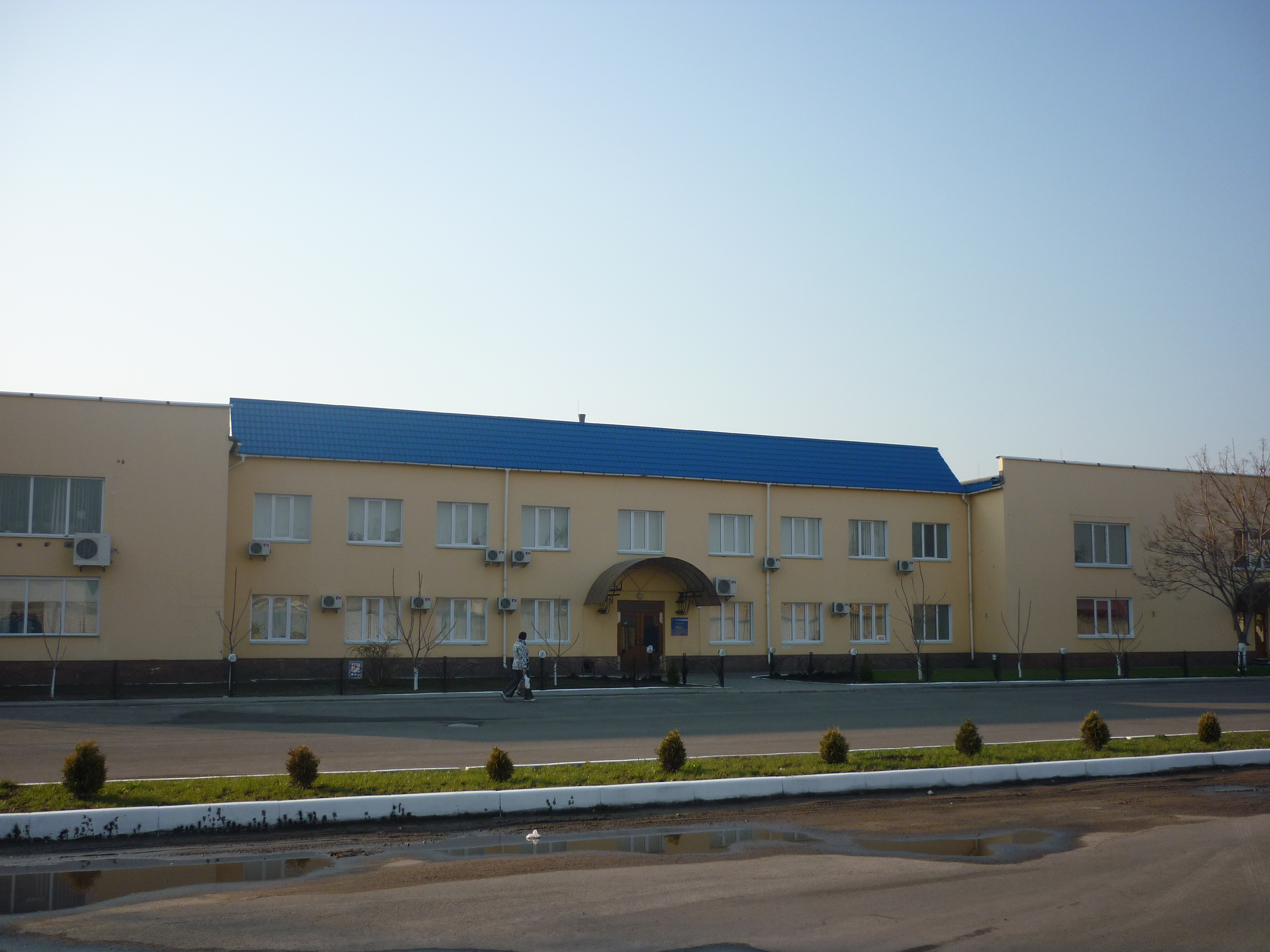 Лако-фарбовий завод "Аврора" в Черкасах